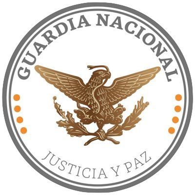 Escudo de la Guardia Nacional de México